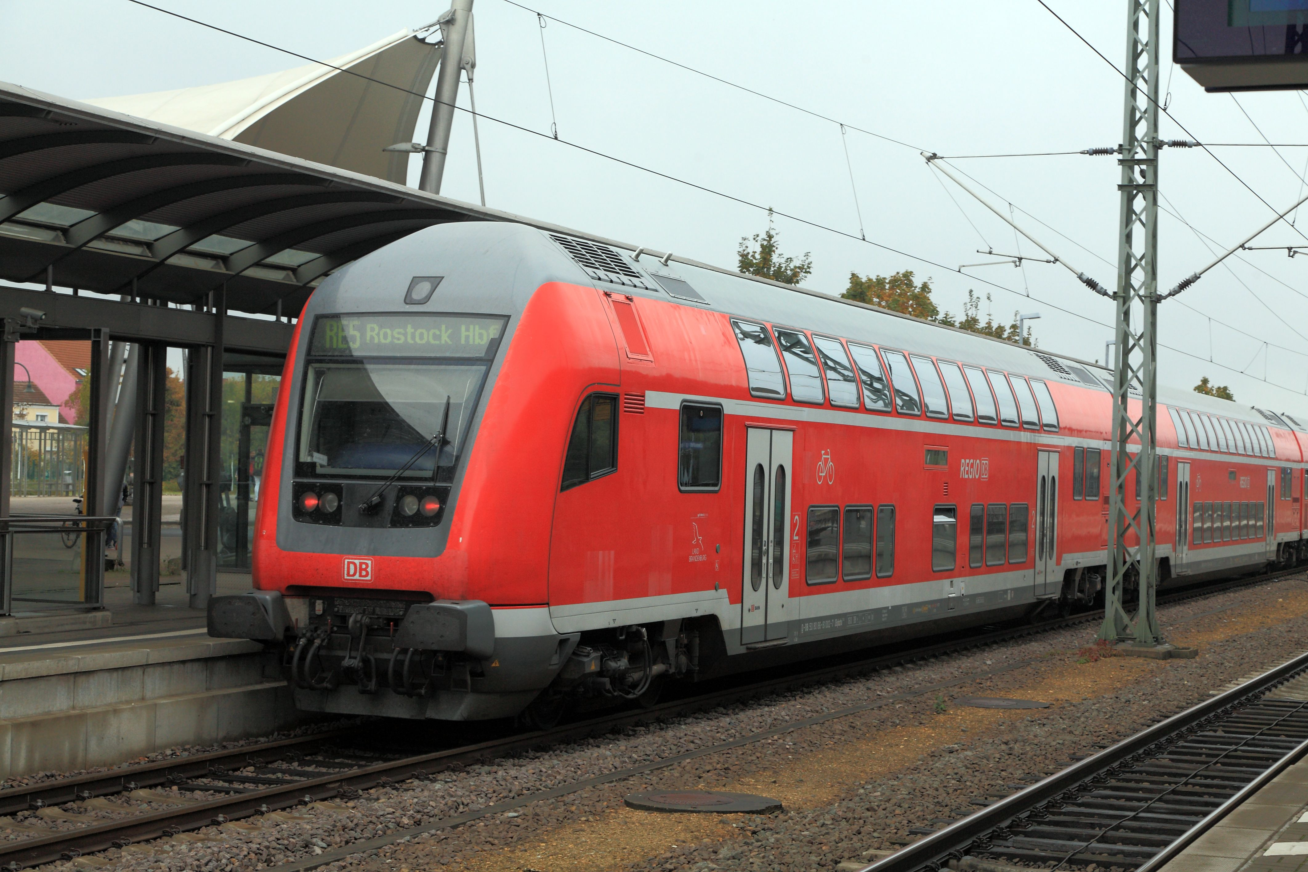 Klimatisierter Steuerwagen für 160km/h, Regionalexpress Rostock–Wittenberg und zurück.